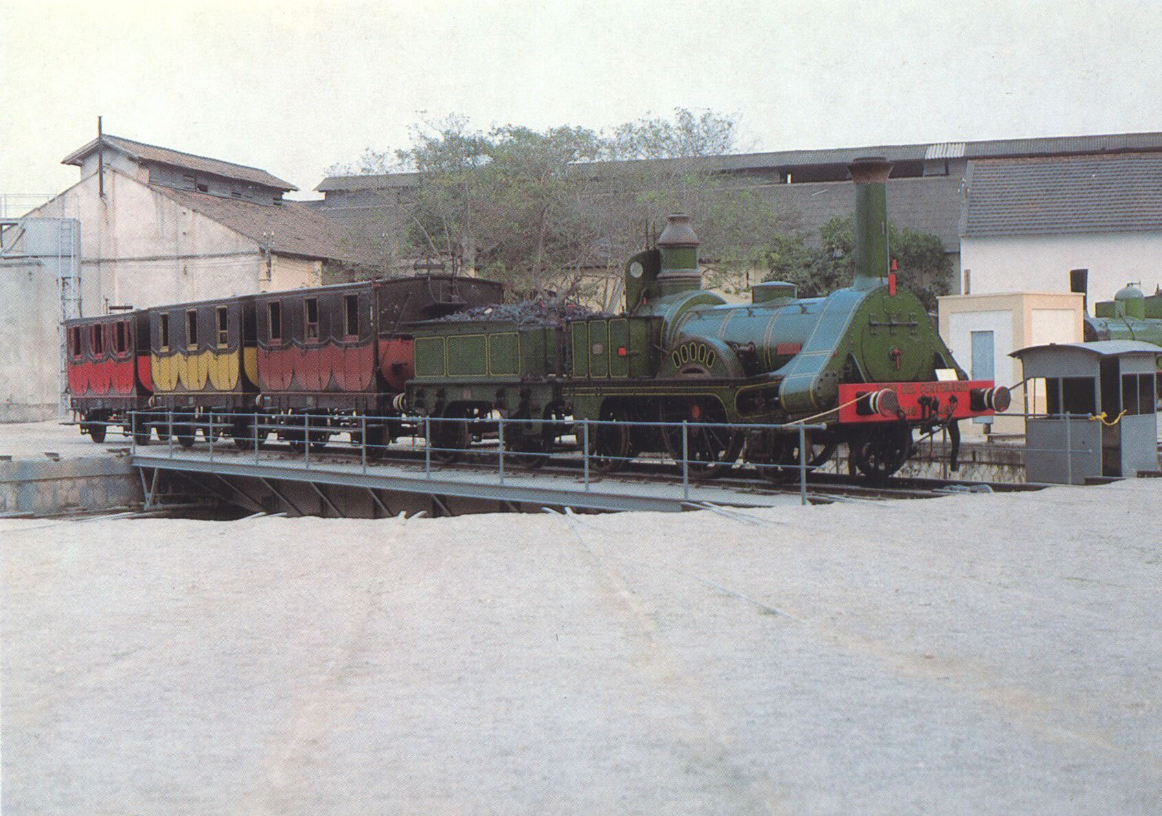 Tren del centario